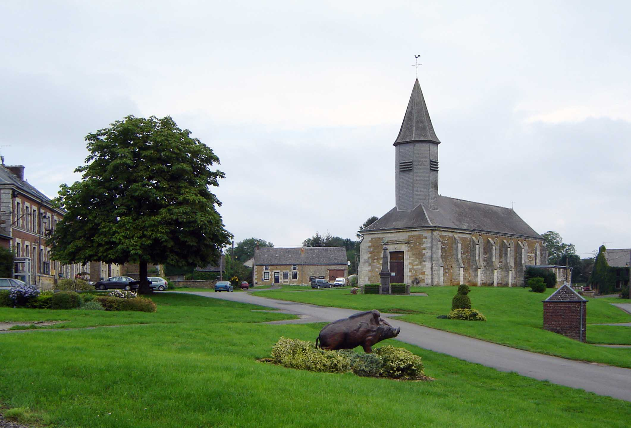 Het kerkje en dorpsplein van La Neuville-aux-Tourneurs (Neuville lez Beaulieu) in de Ardeense Thiérache.